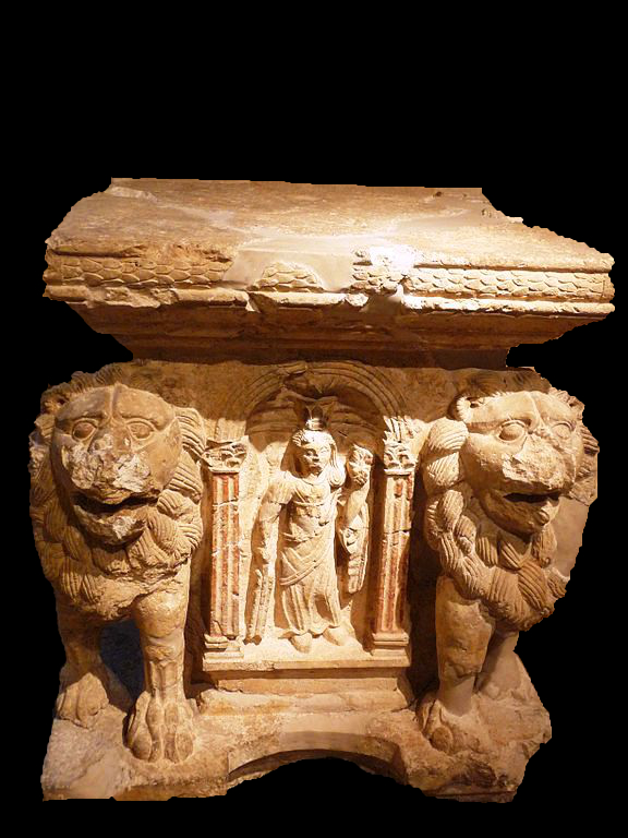 "Ara" romana in calcare, rinvenuta presso il villaggio di Niha nella Valle della Beqa'(Libano) e conservata presso il Museo nazionale di Beirut.